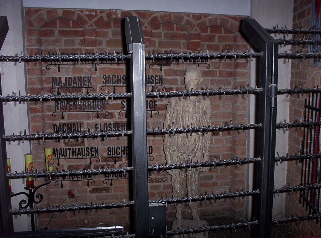 Szczecin Katedra św. Jakuba